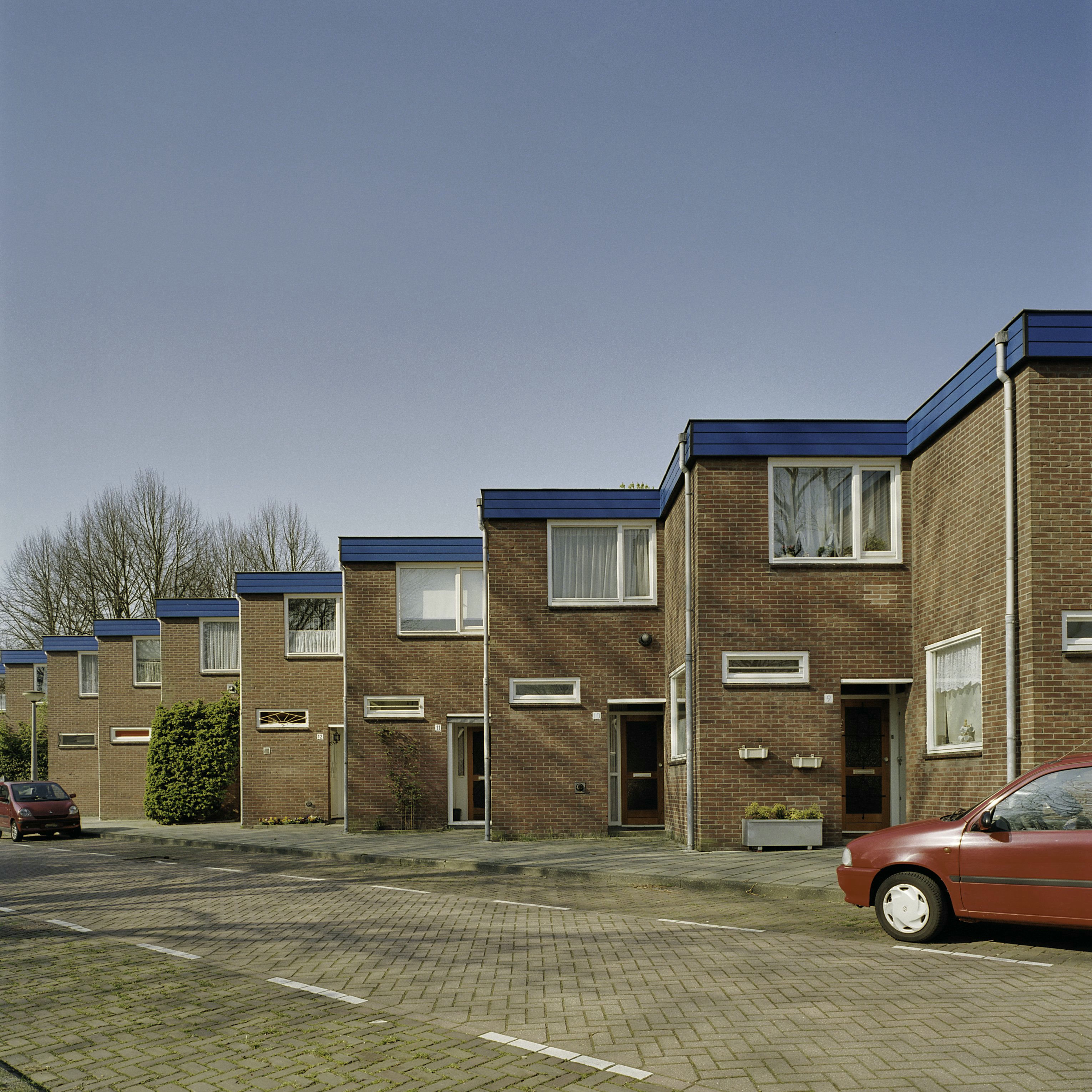 Slotervaart/ Eengezinswoning: Zaagtandwoningen bestaande uit L-vormige woonblokken met overhoeks geplaatste eengezinswoningen (opmerking: Gefotografeerd voor Monumenten In Nederland Noord-Holland)